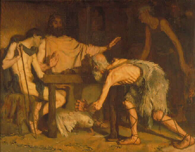 Adolphe Déchenaud, Jupiter et Mercure reçus par Philémon et Baucis, 1891, Mâcon, musée des Ursulines